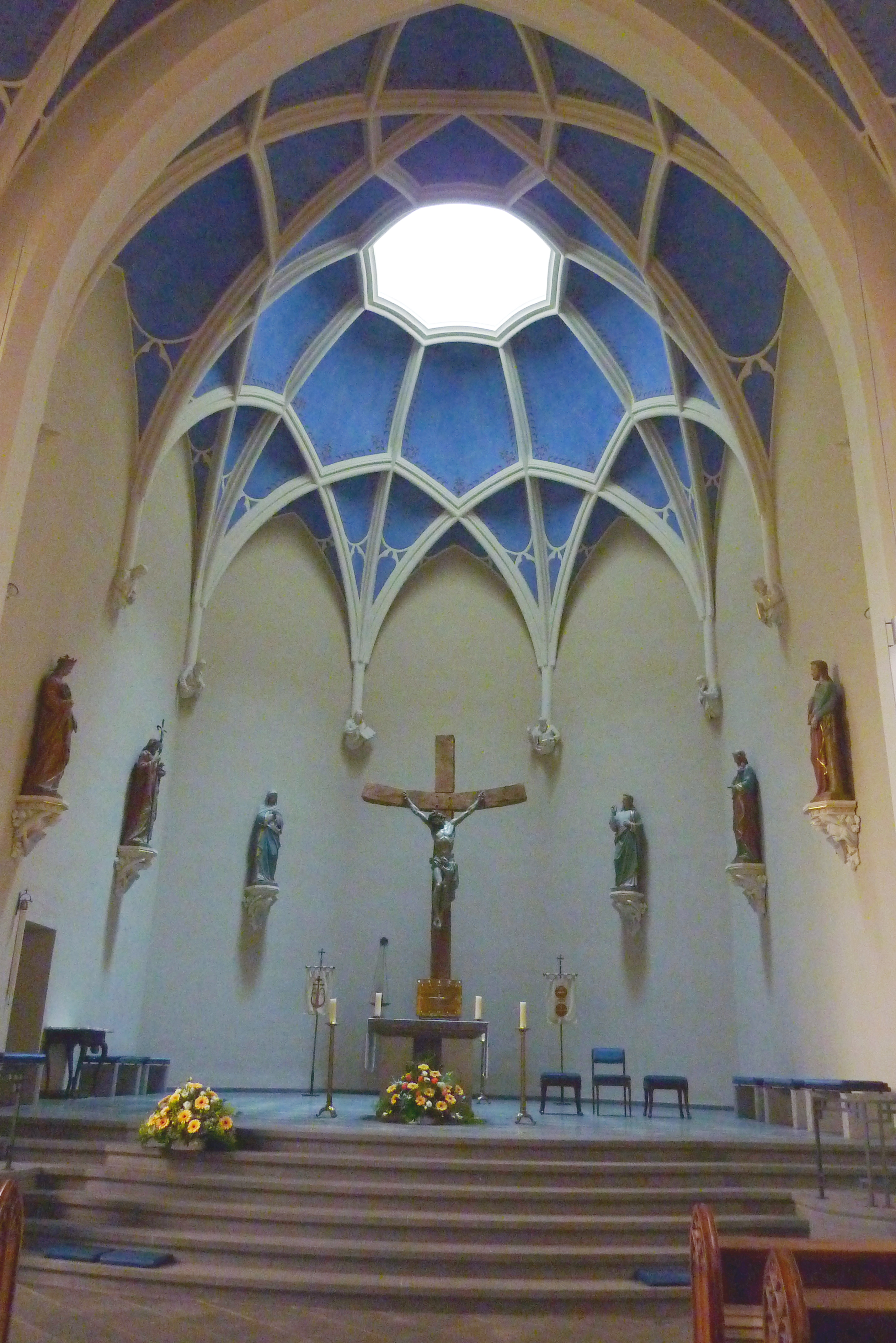 katholische Pfarrkirche St. Johannes der Täufer in Treis, einem Ortsteil von Treis-Karden im Landkreis Cochem-Zell (Rheinland-Pfalz)